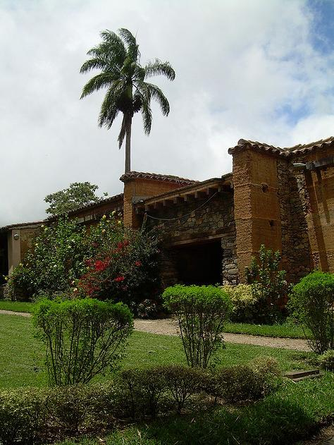 Trapiche del clavo, Bocono, Trujillo, Venezuela